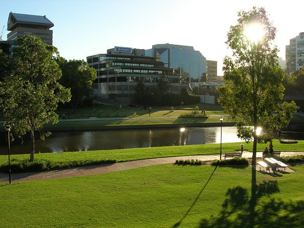 Parramatta River at Parramatta